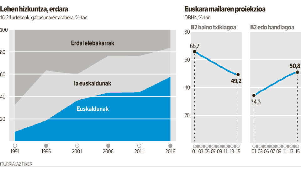 EAE euskara maila proiekzioa